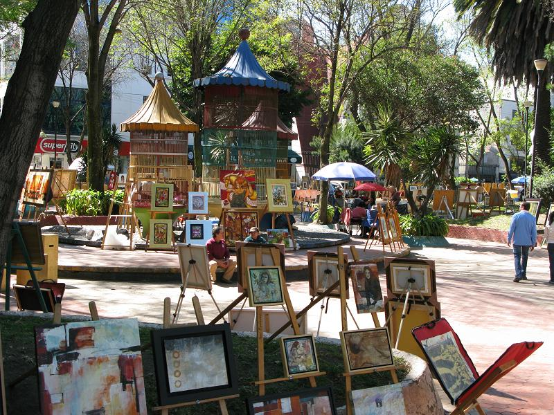 Jardin del Arte, Sullivan, México, D.F.